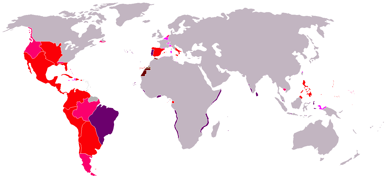 Mapa imperio español